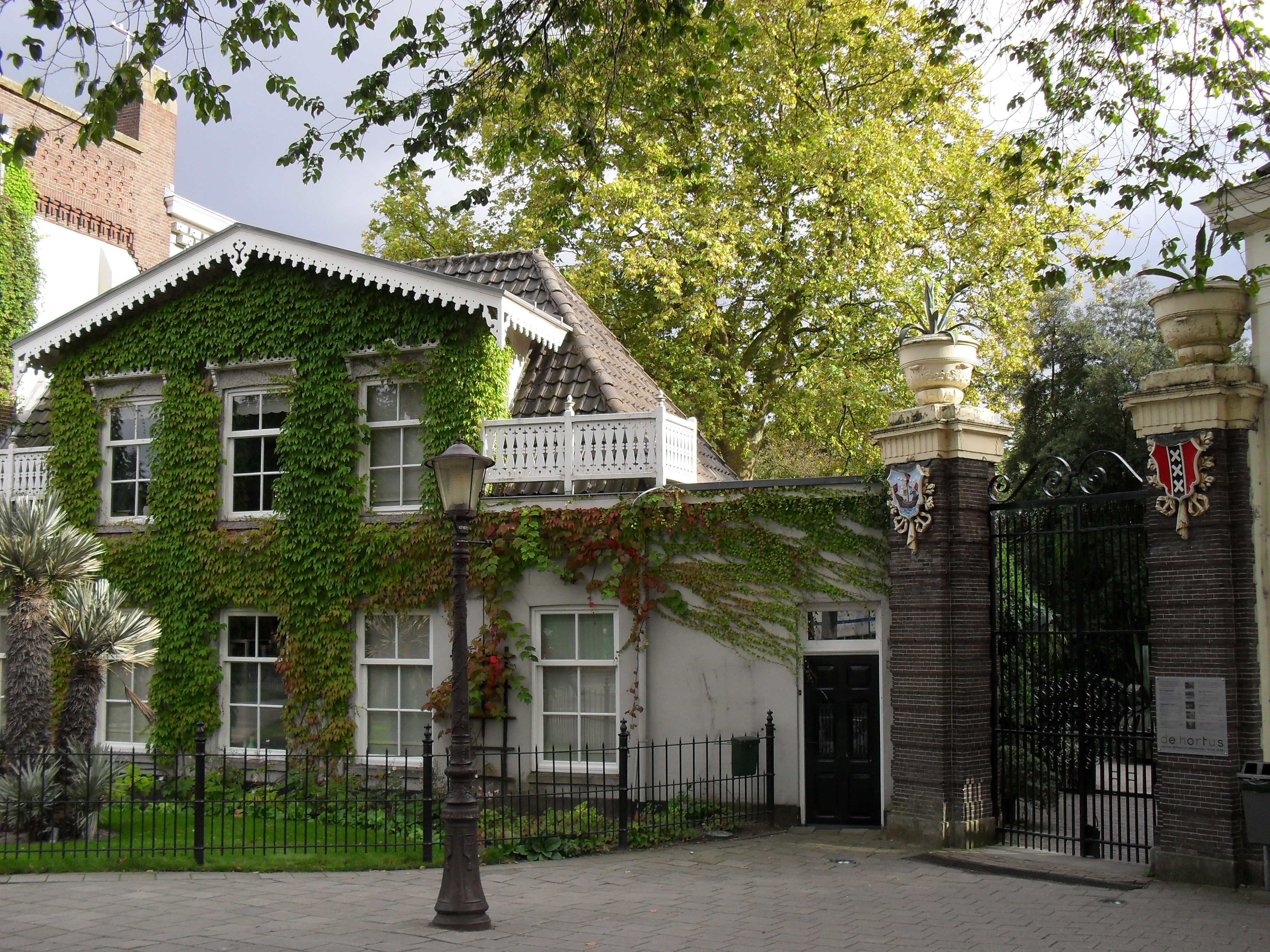 Hortulanuswoning en entreegebouw van de Hortus Botanicus, Plantage Middenlaan 2a, Amsterdam